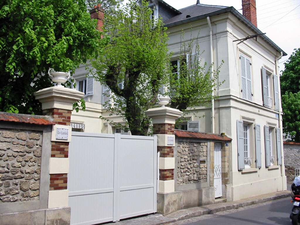 Le Castel, maison ou séjourna Albert Dubout à Mézy-sur-Seine (Yvelines)